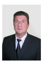 Хряпінський Петро Васильович